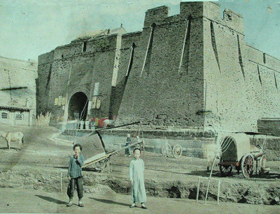 中文（中国大陆）: 沈阳大北门